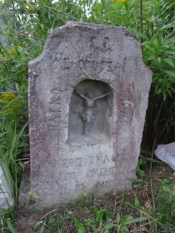 Мілюнцы. На старых могілках